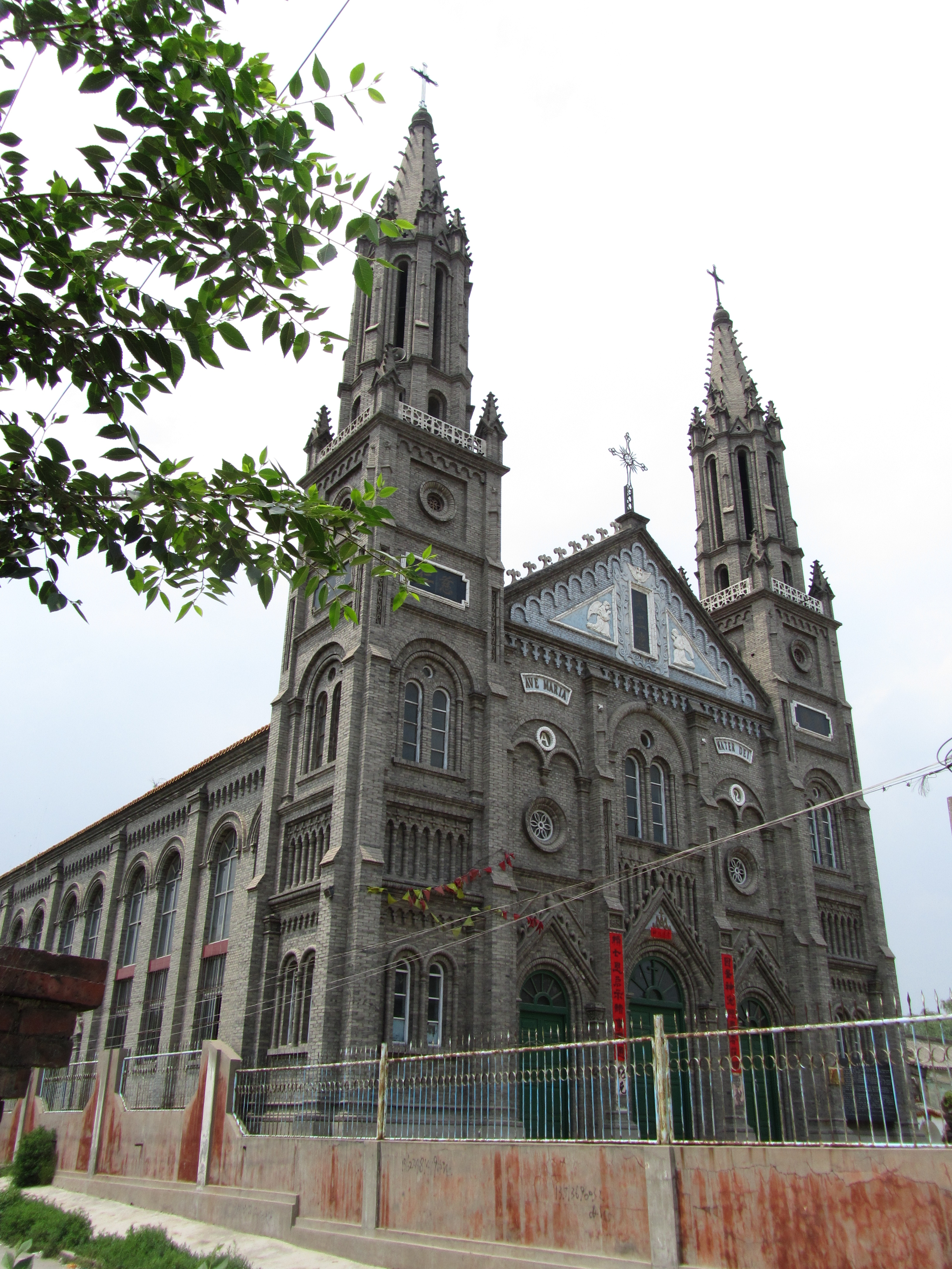 天主教朔州教区主教座堂，西南视图。